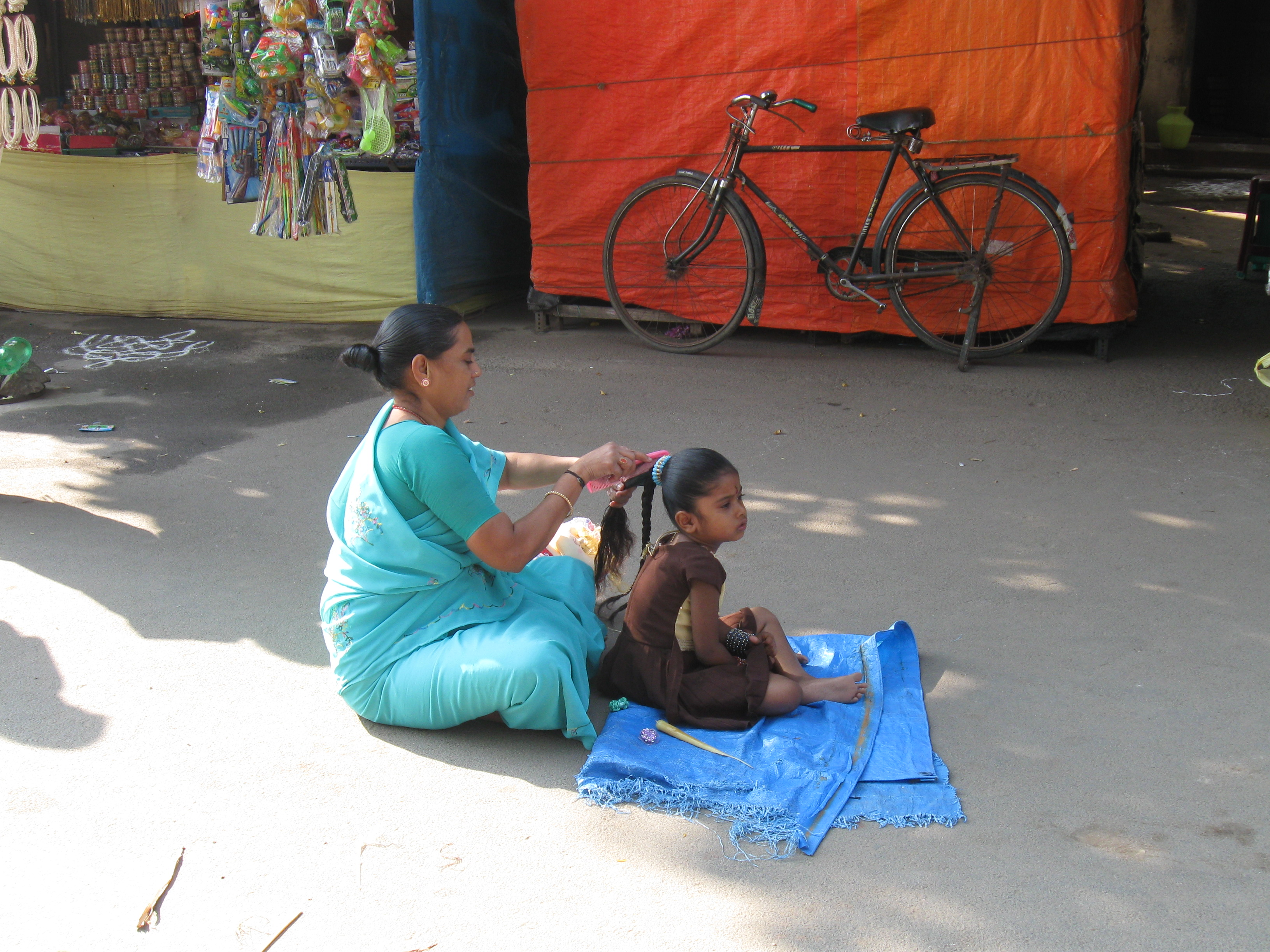 தலைமுறைகளின் ஒழுங்கிலும் ஒப்புரவிலுமே மரபுகள் காக்கப்படுகின்றன. அதிலும் பெண்களுக்குள்ளான மரபுப் பிணைப்புகள் மிக அழகானவை. கூந்தல் பராமரிப்பில் தொடங்கும் அப்பிணைப்புப் பின்னலின் ஒரு காட்சி.